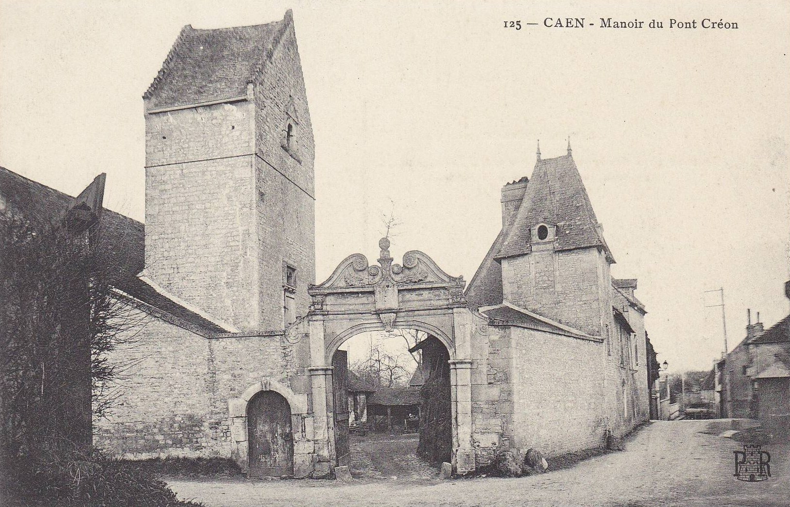 Manoir du Pont-Créon à Caen, au début du XXe siècle.